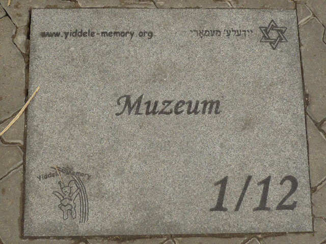 Radomsko. Otwarte Muzeum Żydowskie 1.12